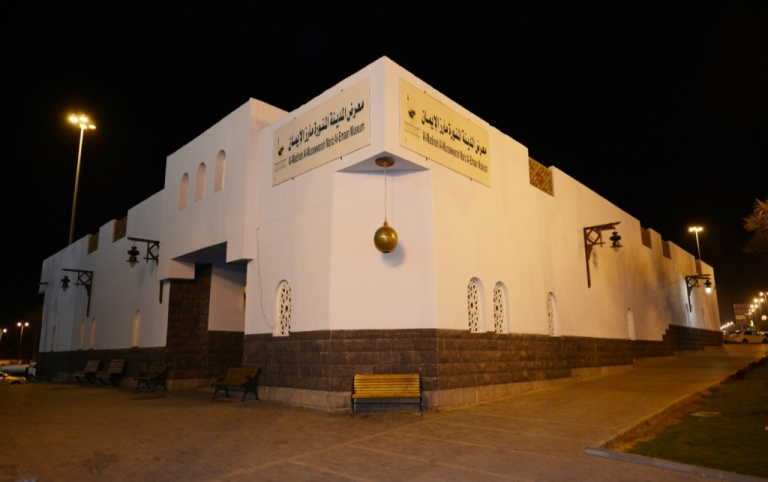 معرض مارز الايمان